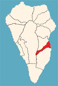 Ubicación del Municipio de Breña Baja